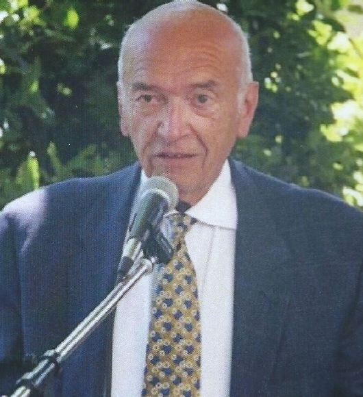 Francis Lescure (1927-2017), docteur vétérinaire, professeur de médecine des équidés et animaux de compagnie à l'École nationale vétérinaire de Toulouse